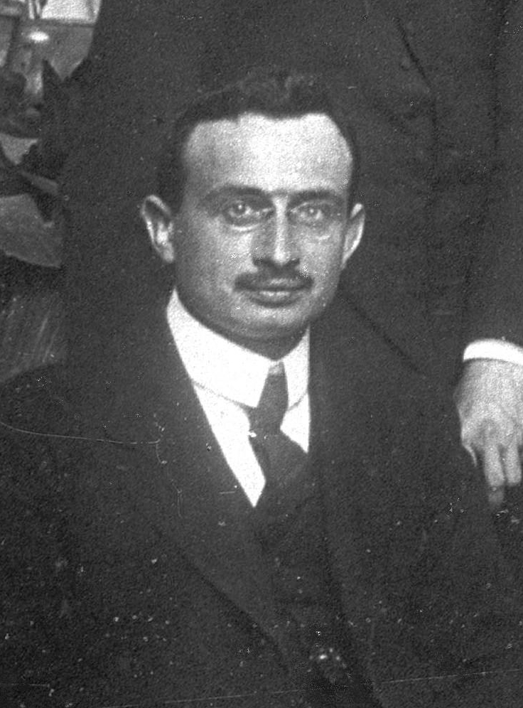 Monseigneur Duchesnet ses élèves à l'École française de Rome en 1919-1920, détail : Jean Bayet